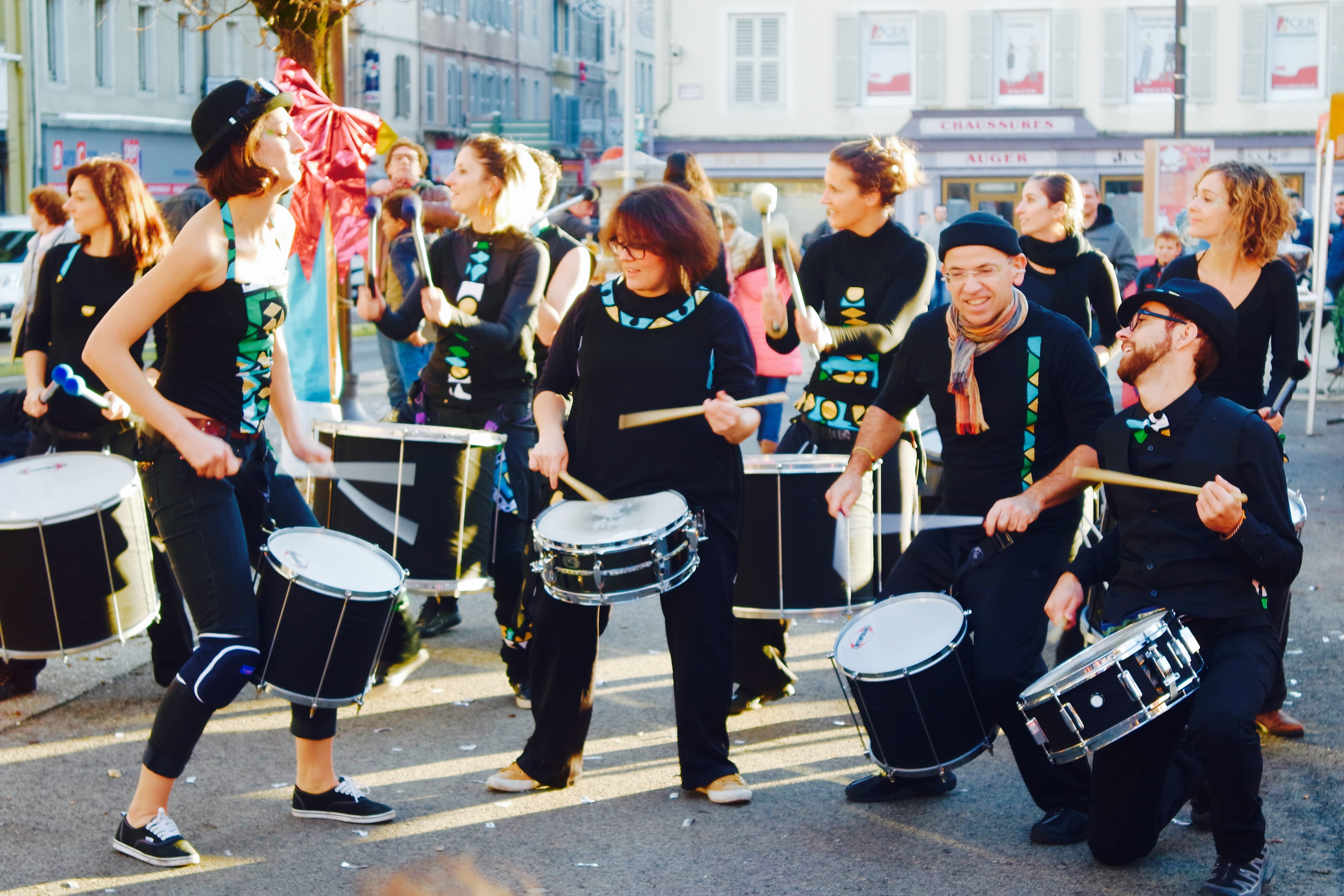 Gaïa'Z Onda est une batucada ethno-urbaine Marseillaise qui mélange les rythmes brésiliens et africains.